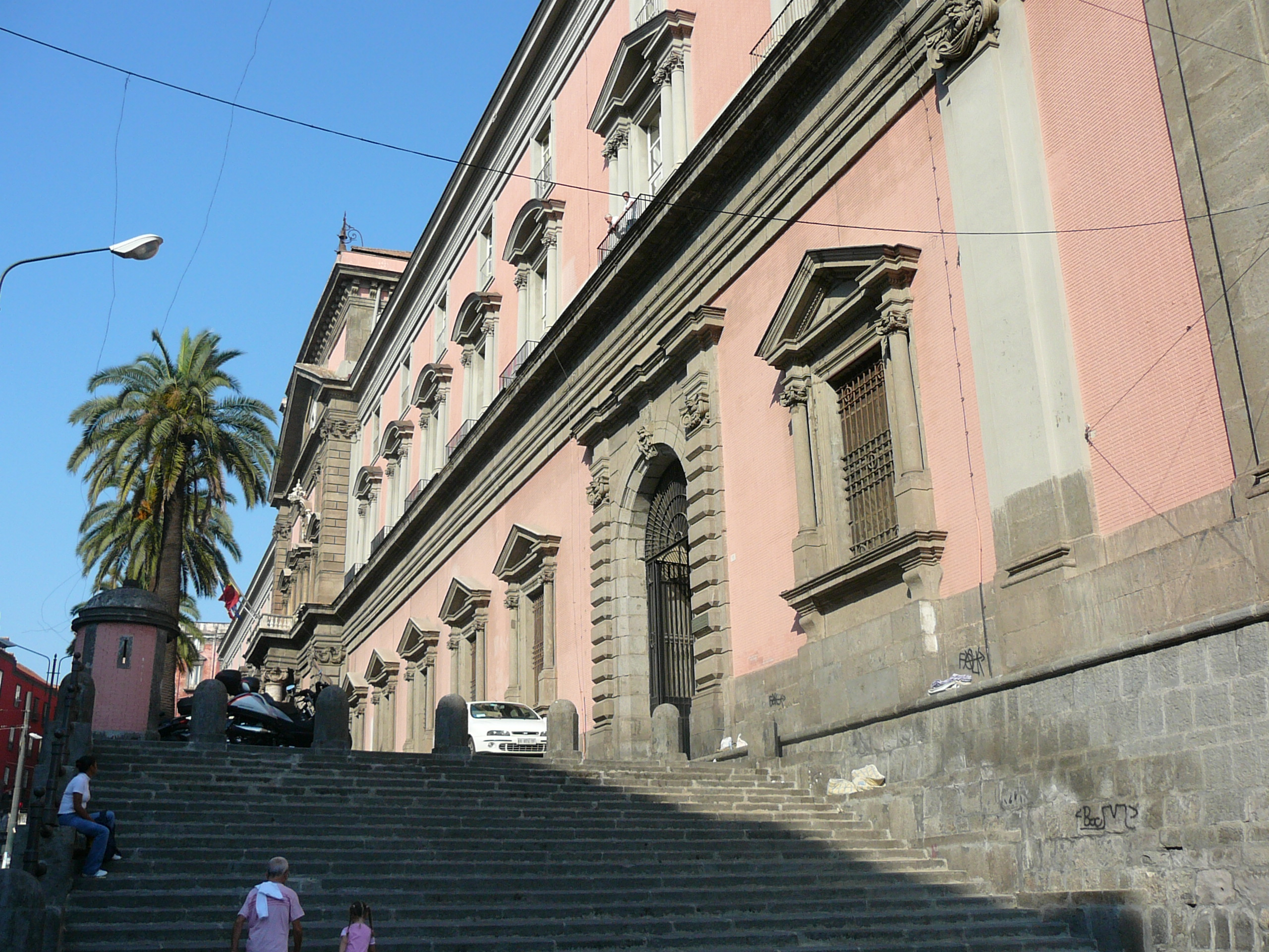 Facciata del Museo Archeologico Nazionale di Napoli.